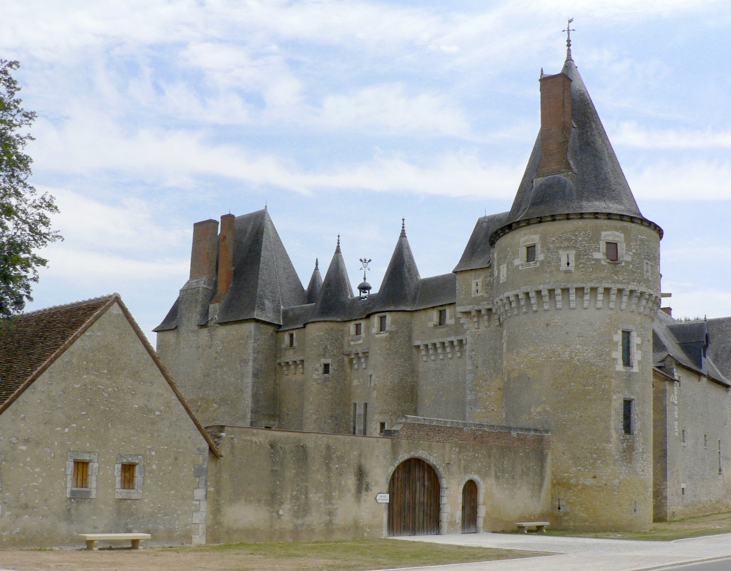 Château de Fougères-sur-Bièvre, Loir-et-Cher, France